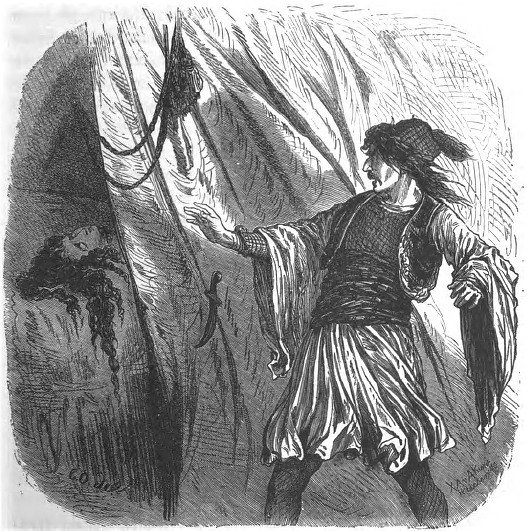 Szene aus Die Geschichte von der abgehauenen Hand